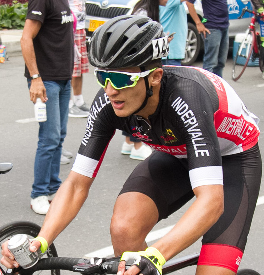 Bryan Gómez Campeonato Nacional de Ruta 2018 Medellín, febrero 4 de 2018.